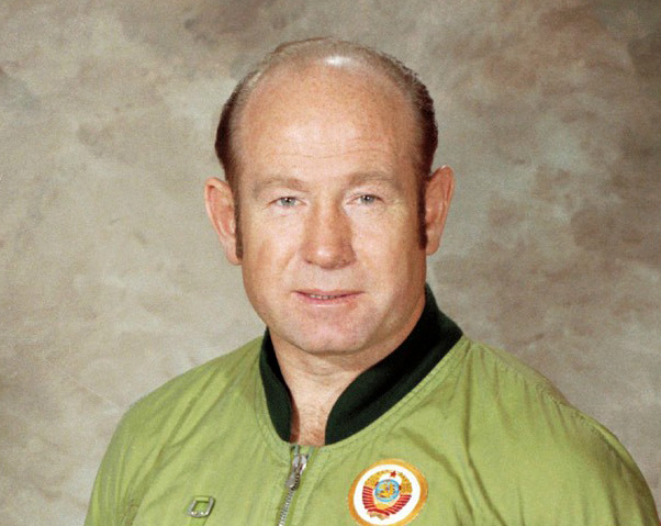 Aleksei Leonov (Apollo-Soyuz Test Project)